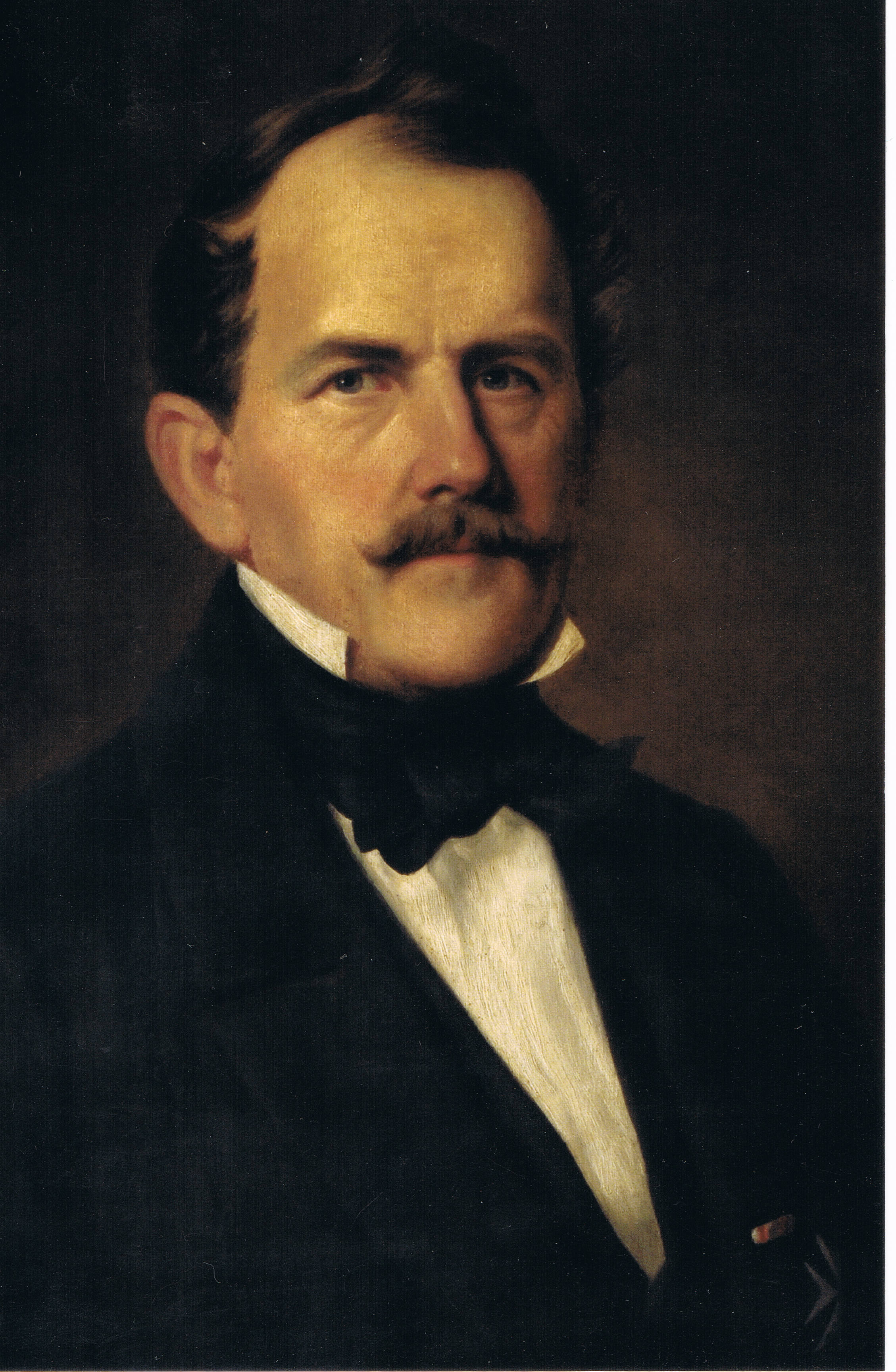 Ludwig Gustav von Winterfeld (1807-1874), deutscher Offizier, Politiker und Familienhistoriker, Mitglied des preußischen Herrenhauses